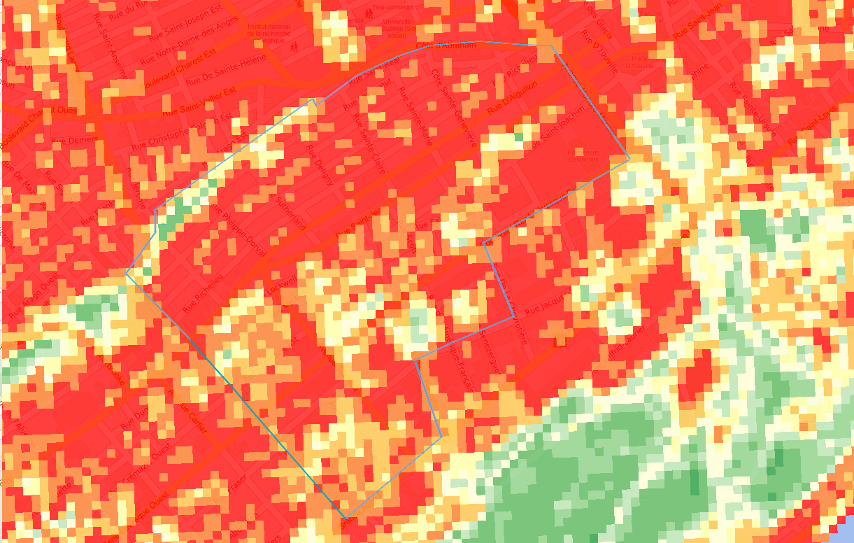 Cette carte est une adaptation des données disponibles sur le site de Données Québec en licence CC 4.0 BY-SA